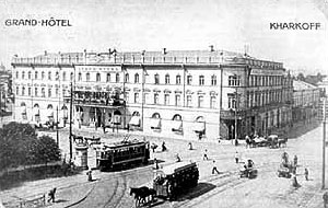 Харьков, Гранд-Отель «Европа» (сеть гостиниц Российской Империи, см. такой же в СПб), разрушен в 1943, на Павловской площади (ныне Розы Люксембург). В годы Гражданской войны в России здесь находился штаб (не штаб-квартира командующего) Добровольческой армии Май-Маевского (на первом этаже был ресторан, на верхних проживали офицеры и командированные в штаб).